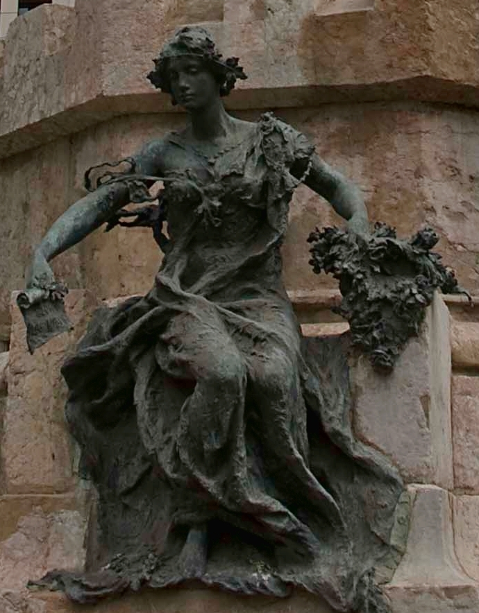 Figura femenina alegórica a la ciudad de Zaragoza. Detalle del Monumento a los mártires de la religión y de la patria. Zaragoza (España)